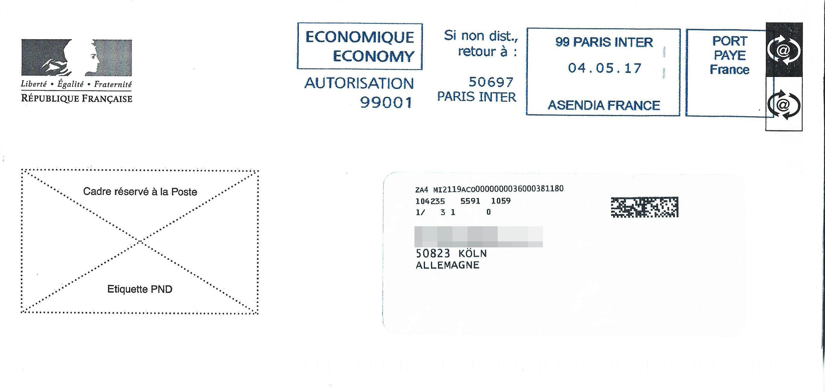 Briefumschlag Frankreich-Deutschland - Economy - Port Paye France